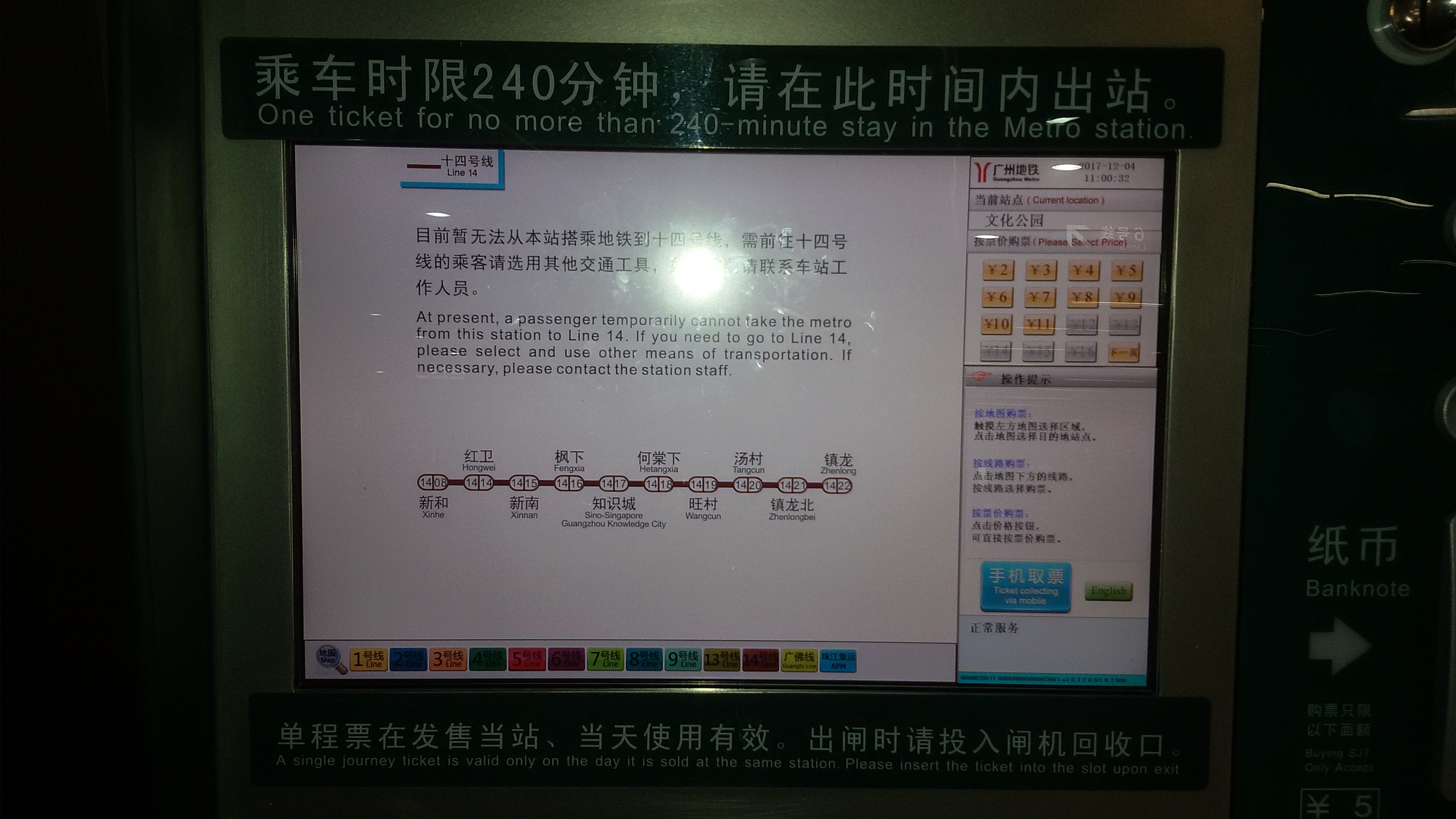 粵語: 2017年12月底，喺廣州地鐵入面嘅賣票機出現咗賣14號綫車飛啲提示，但由於嗰時14號綫屬脫軌營運，所以喺1、2、3、4、5、6、7、8、9同埋13號綫範圍，都唔賣飛到14號綫入面啲車站。